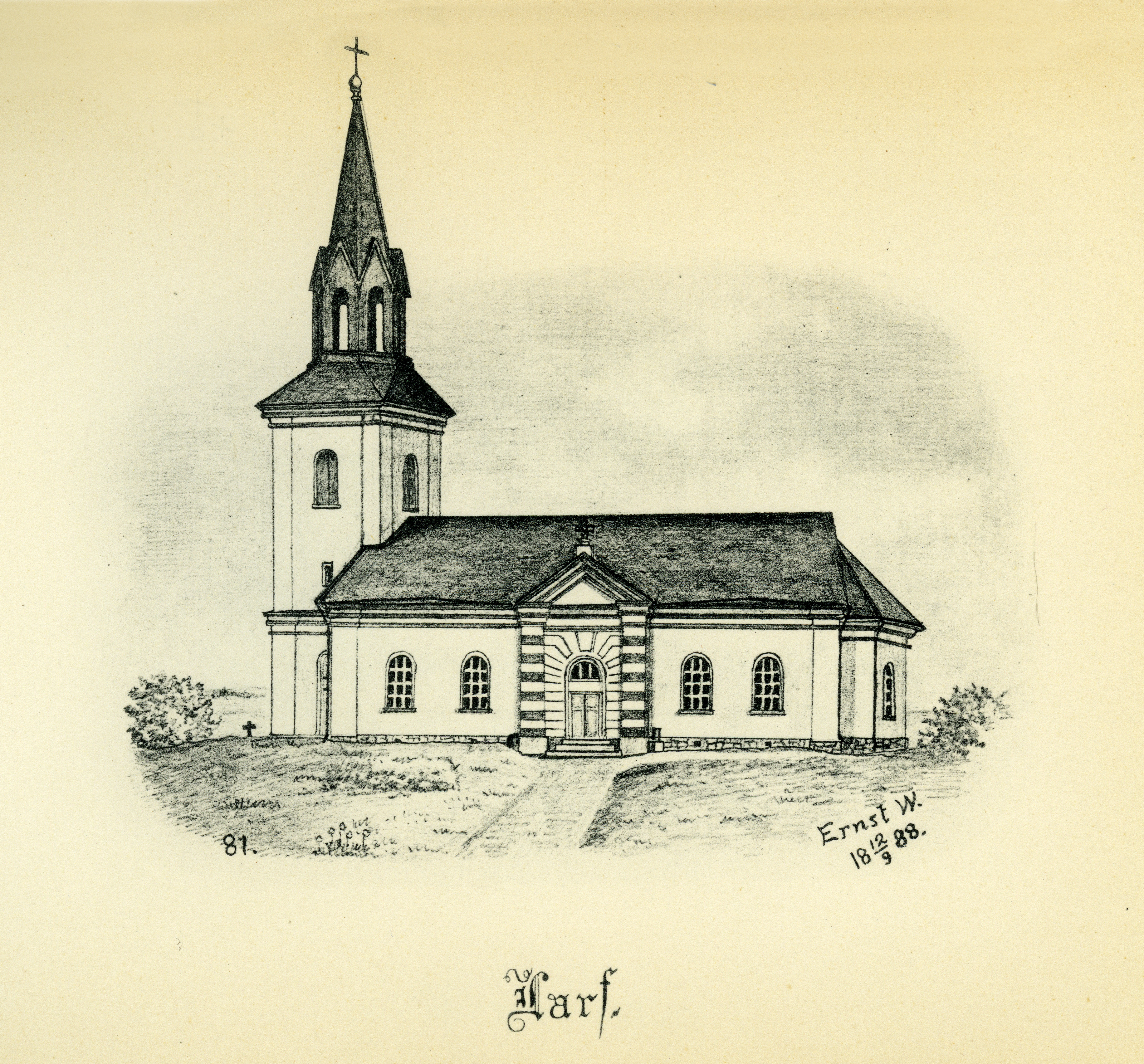 Larvs kyrka år 1888 i Laske härad, Skara stift, Västergötland, Sverige. Teckning av Ernst Wennerblad ur Skara stifts kyrkor (1902).